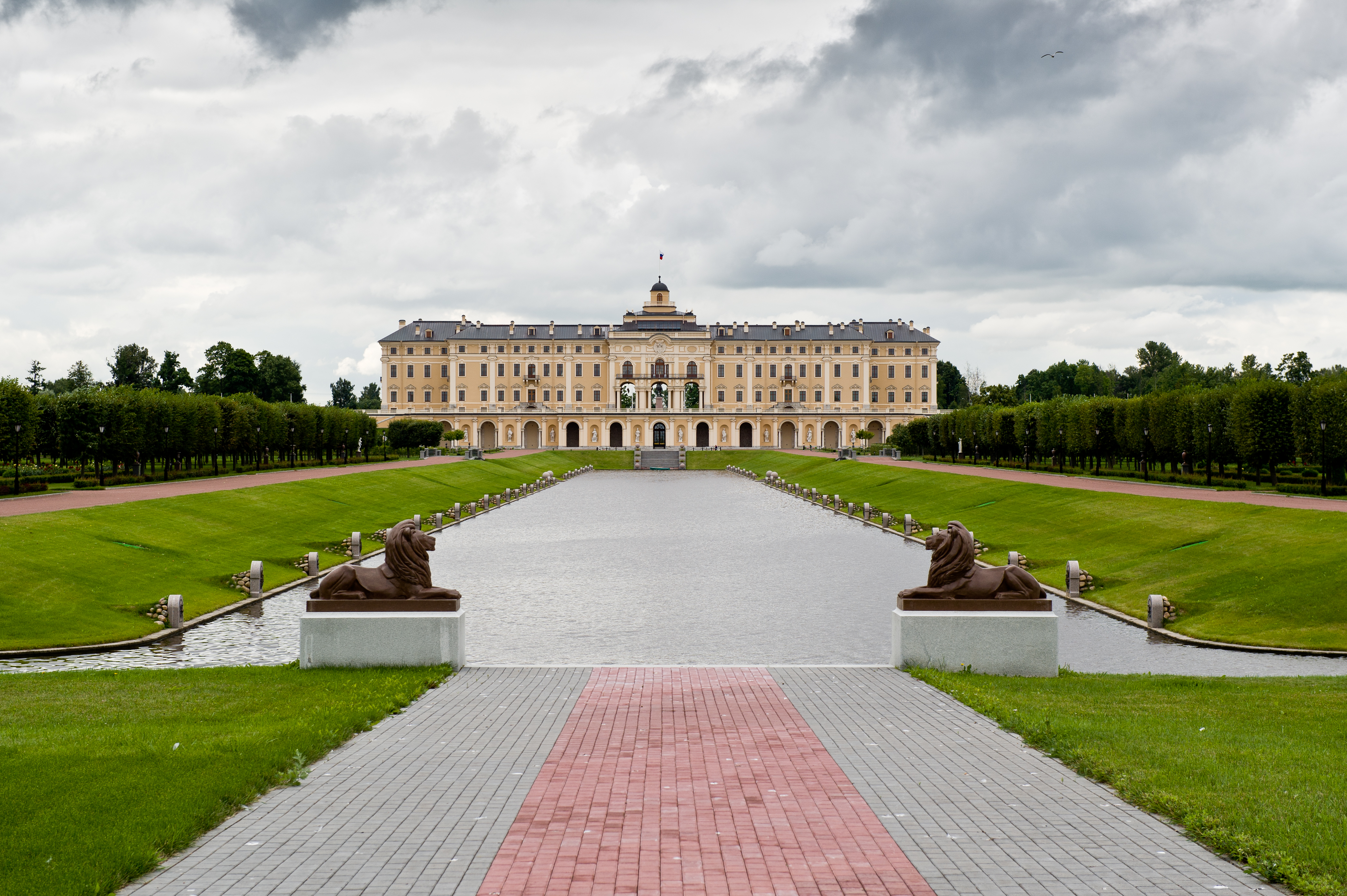 Константиновский дворец, общий план, парковый ансамбль, поселок Стрельна